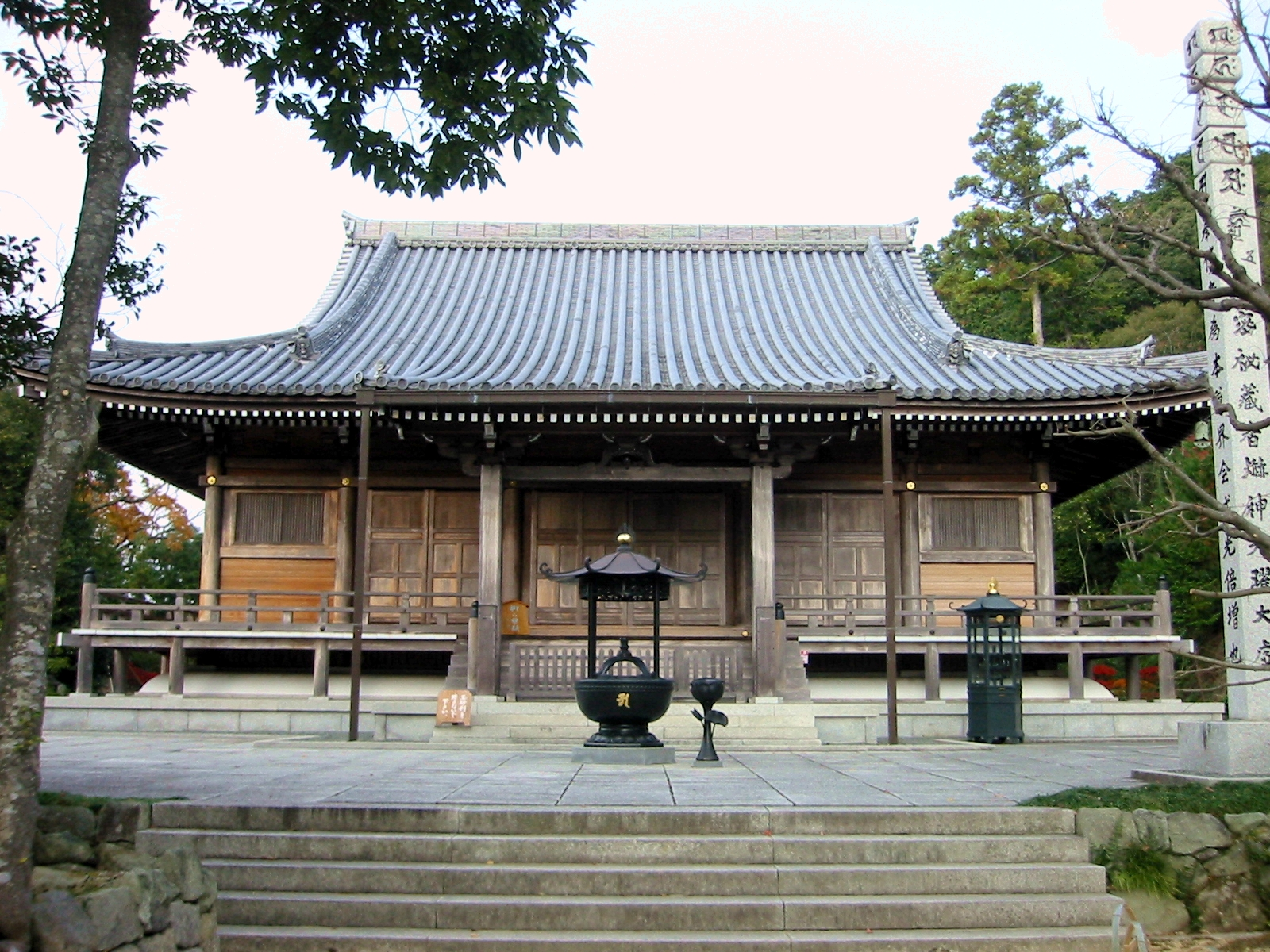 神戸 獨鈷山鏑射寺 本堂